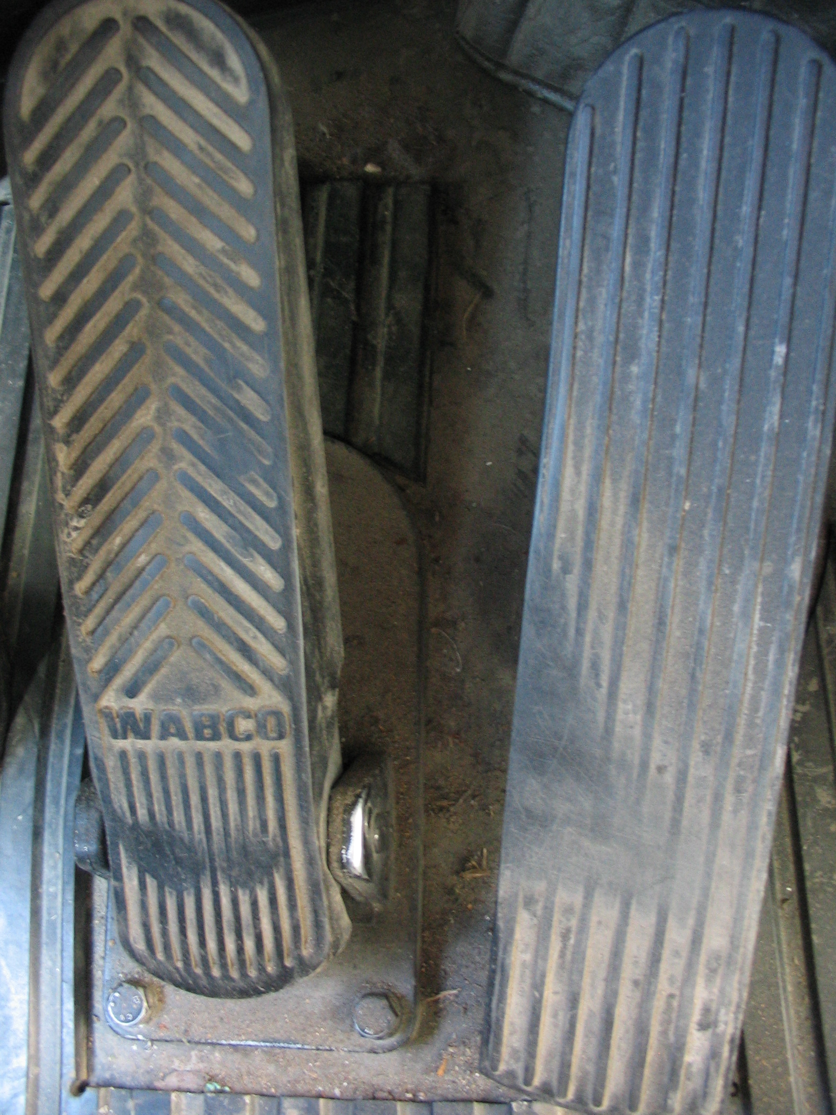 Pédale de frein WABCO sur autocar Setra 215.